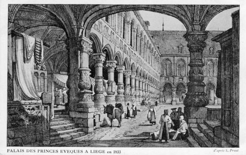 Gravure de la Cour intérieur d u Palais des Princes-évèques en 1833